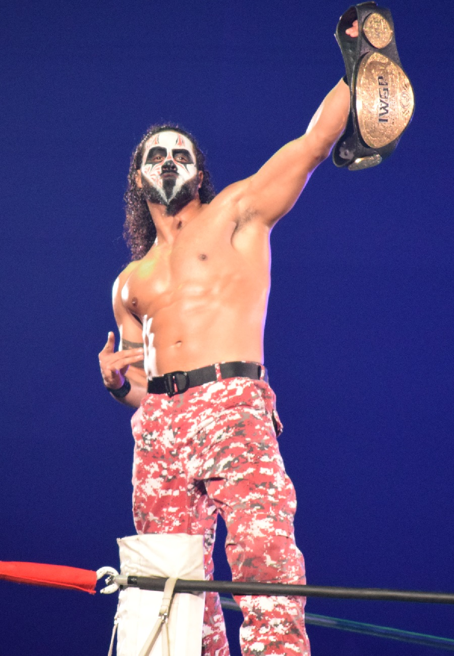 2016年11月5日 大阪府立体育会館「POWER STRUGGLE」 タマ・トンガ